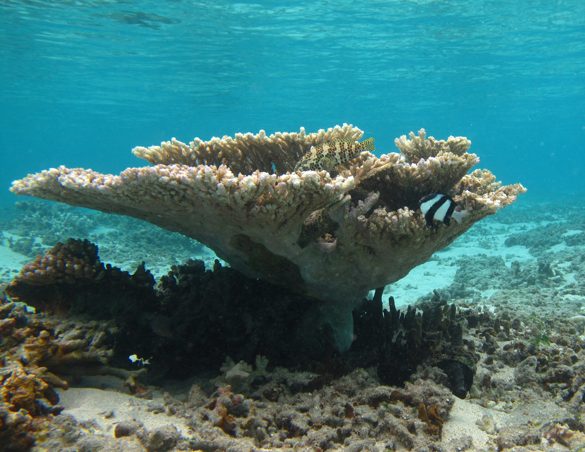 Une colonie de corail "Acropore tabulaire géant" (Acropora hyacinthus) à la Réunion.